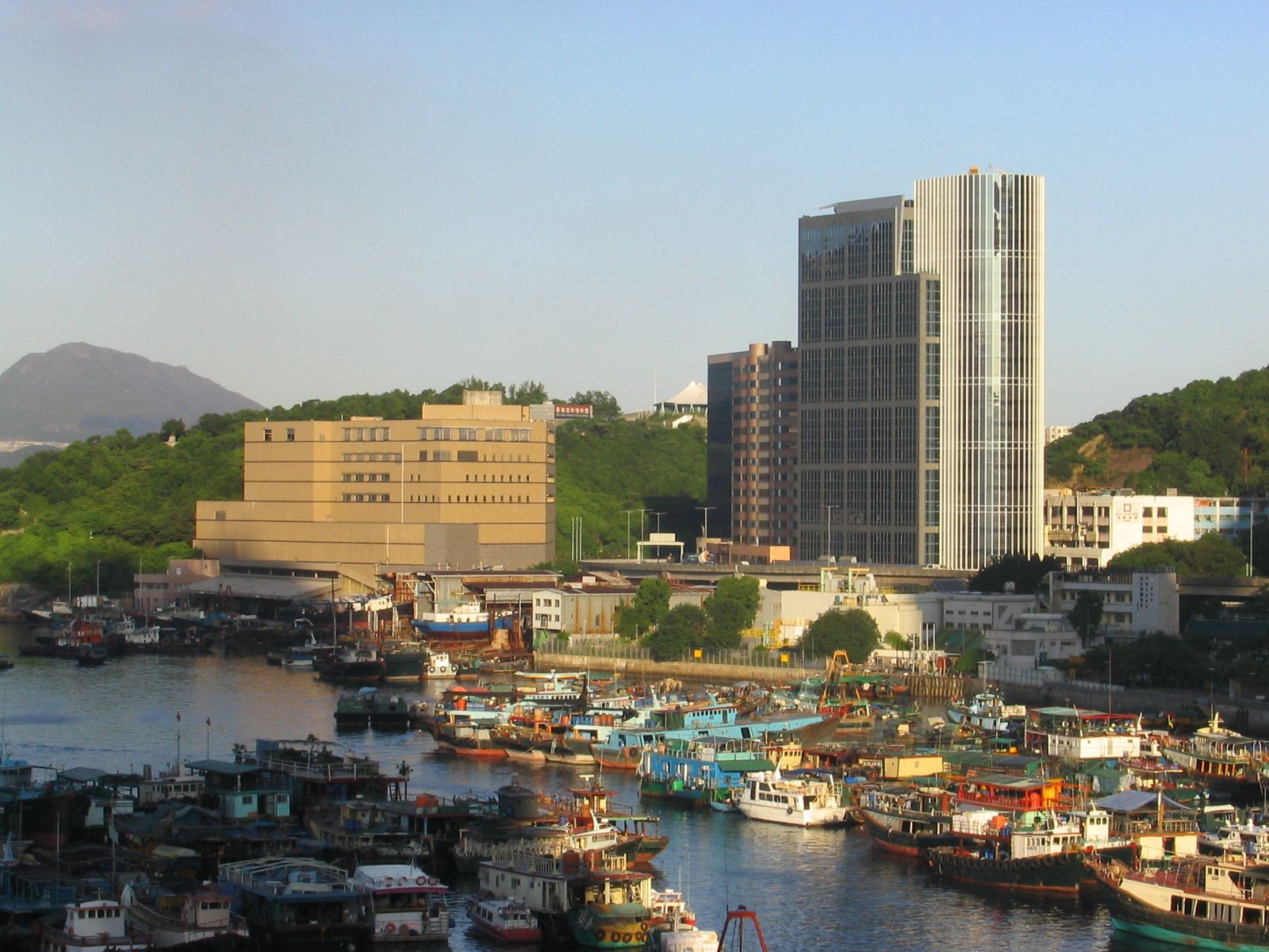 阿公岩及zh:筲箕灣避風塘 A Kung Ngam & Shau Kei Wan Typhoon Shelter